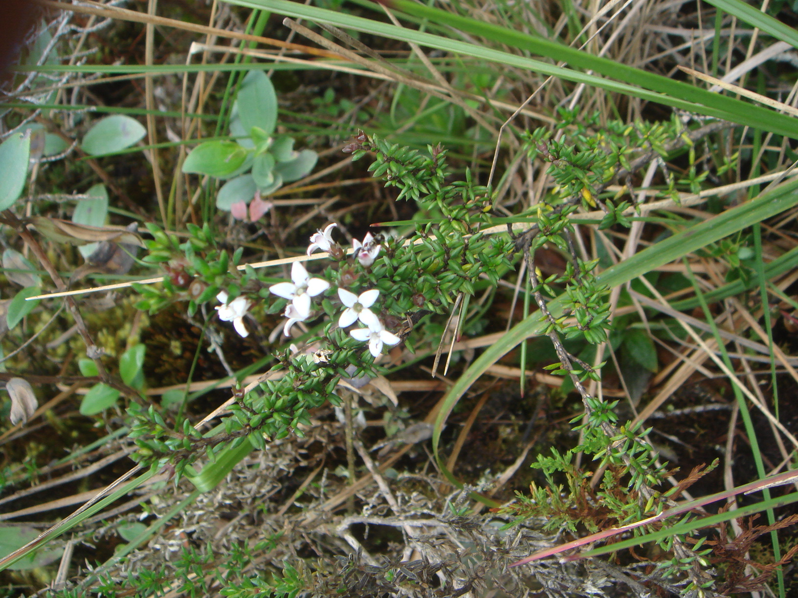 Sanalotodo (Arcytophyllum nitidum) Páramo de Guasca, Cundinamarca, Colombia.